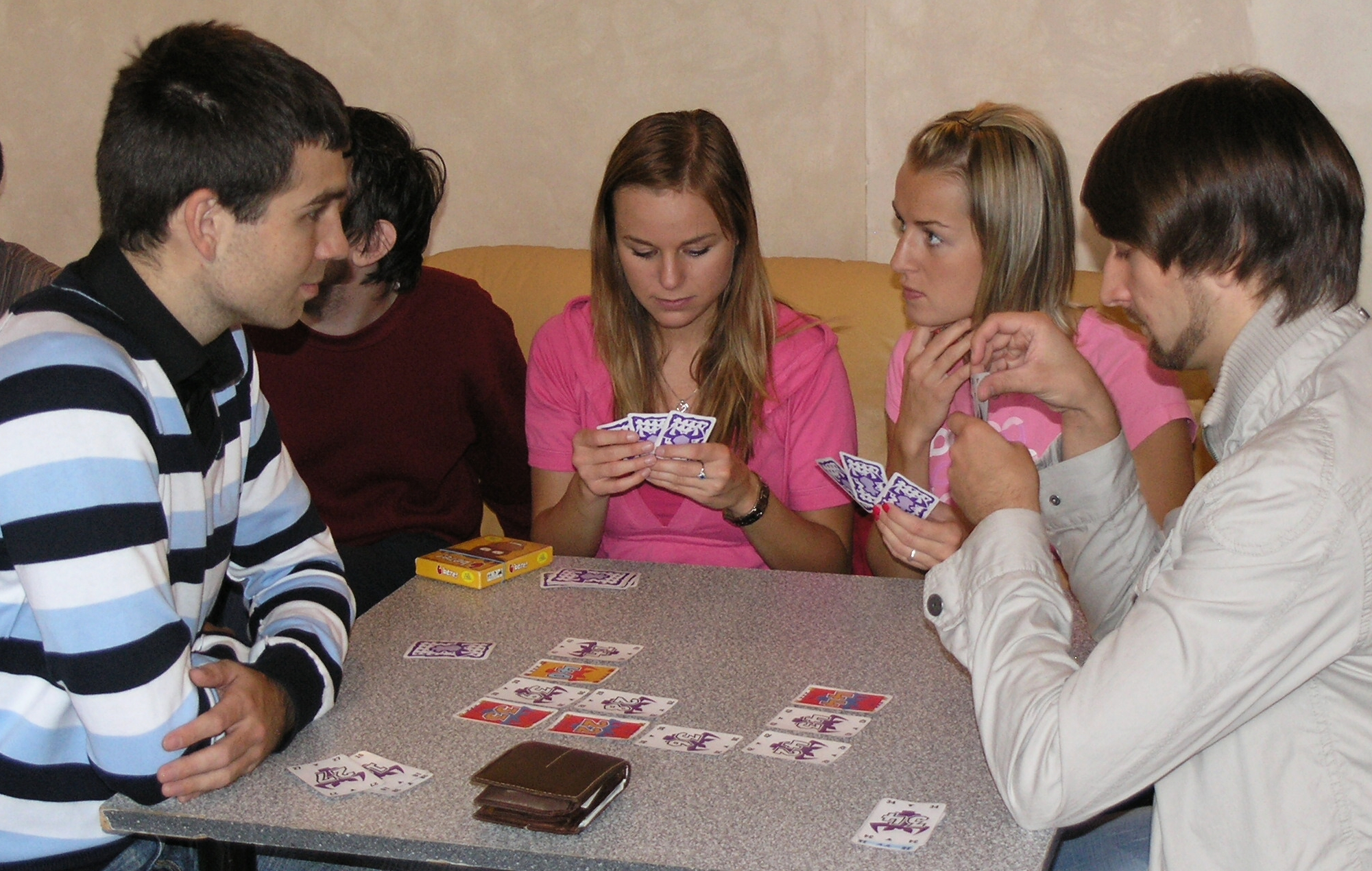 Česky: Deskohraní 2008 - 6 bere!